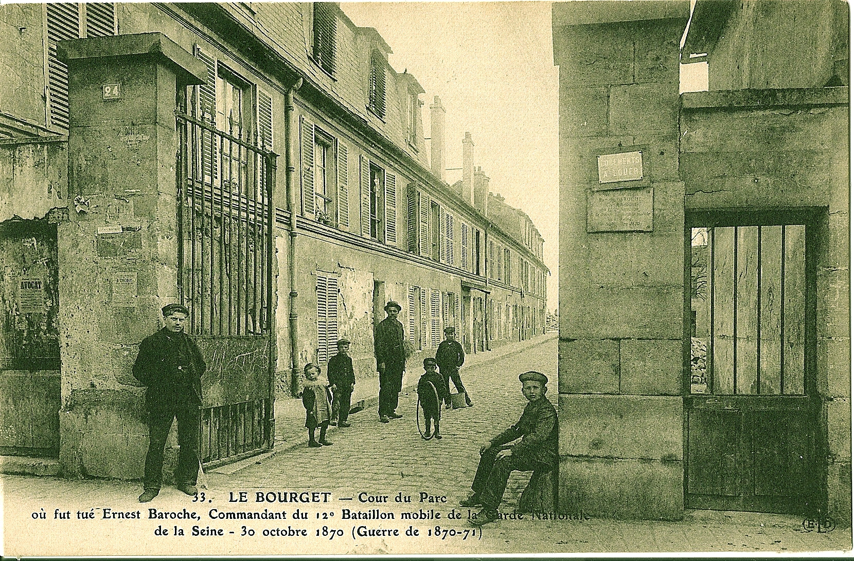 Titre: "LE BOURGET : Cour du parc où fut tué Ernest Bazoche, Commandant du 12e bataillon mobile de la Garde nationale de la Seine - 30 octobre 1870 (Guerre de 1870-71)"